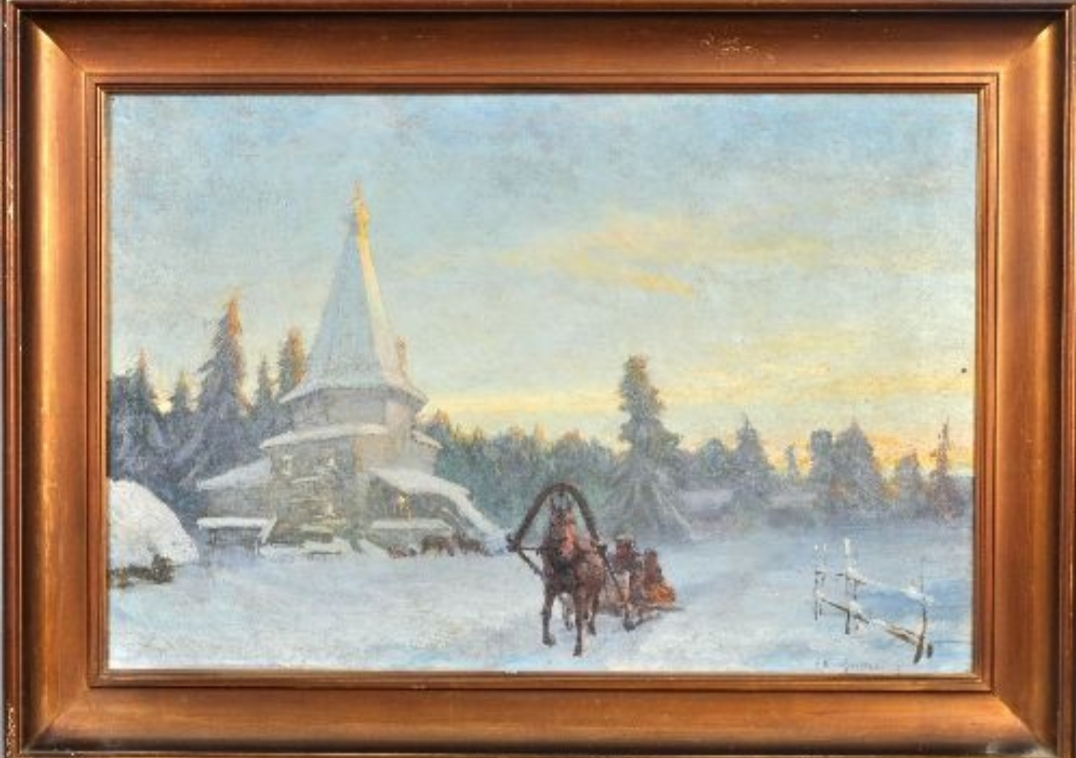 Художник Николай Иванович Краченко "Зимний пейзаж"